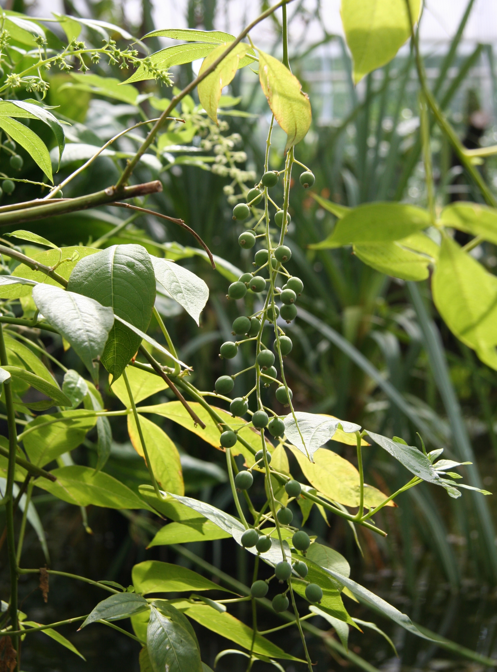 Tovaria pendula im Botanischen Garten Dresden